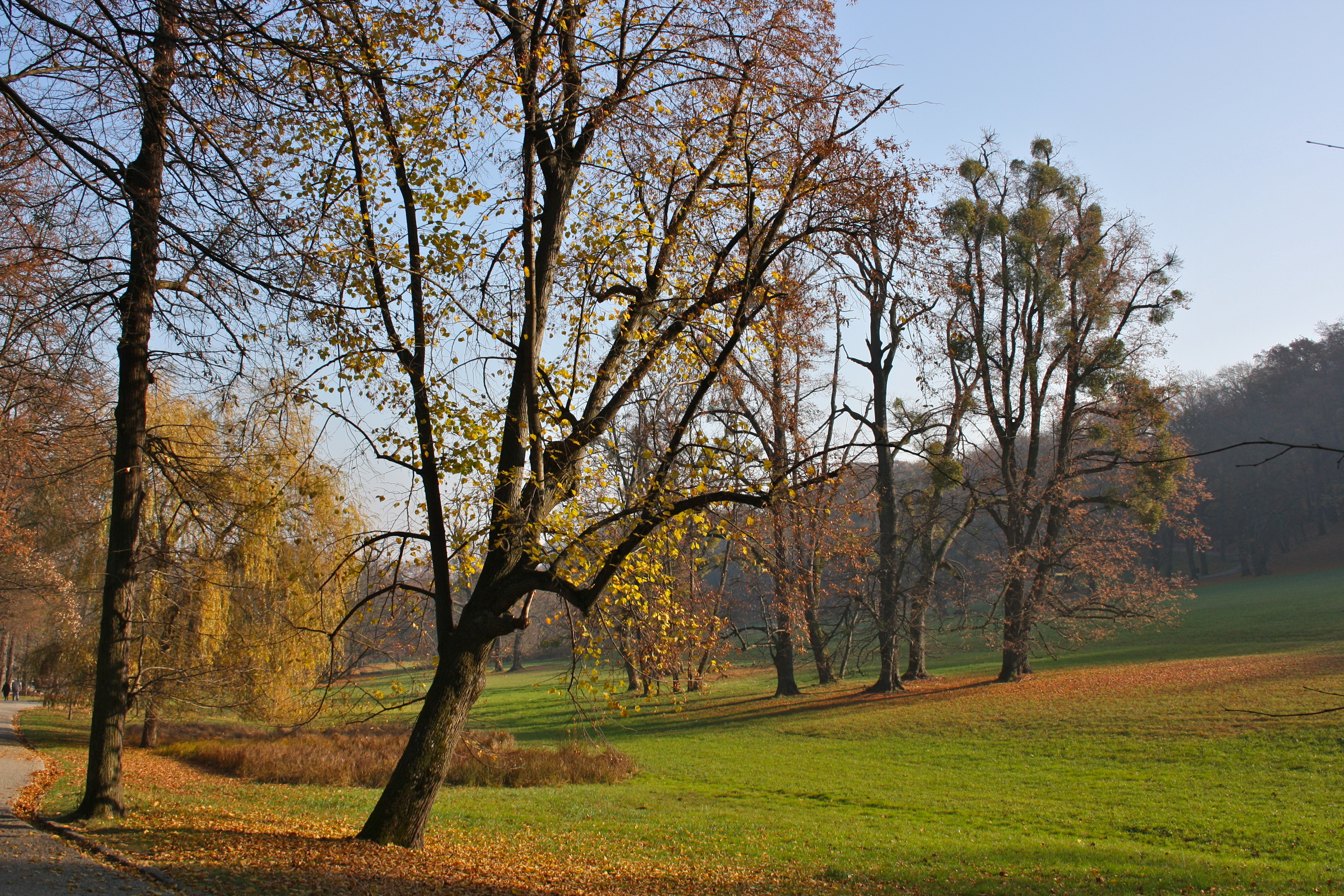 Pötzleinsdorfer Schlosspark im Spätherbst.